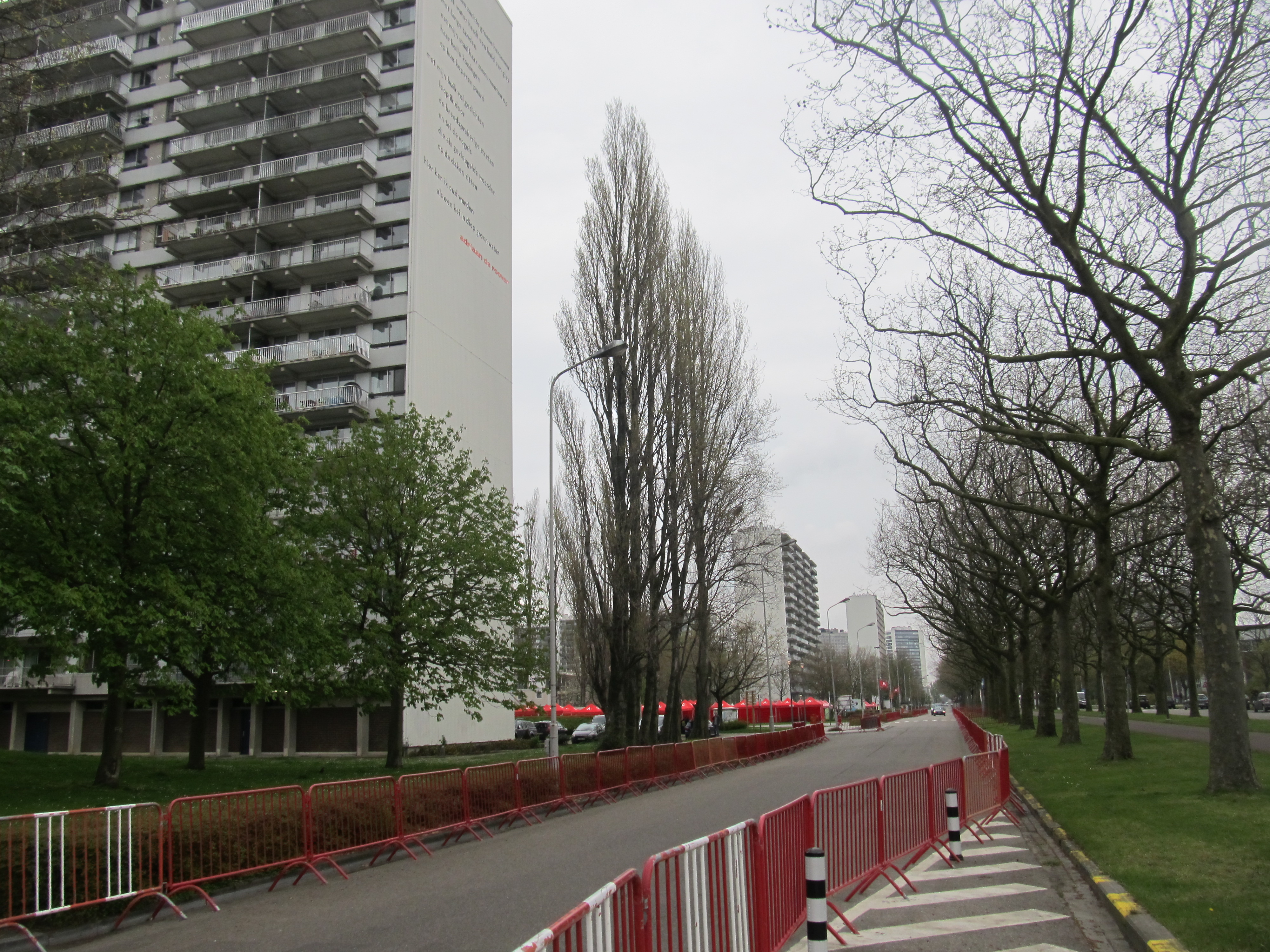 De Gloriantlaan op Linkeroever in Antwerpen, België.